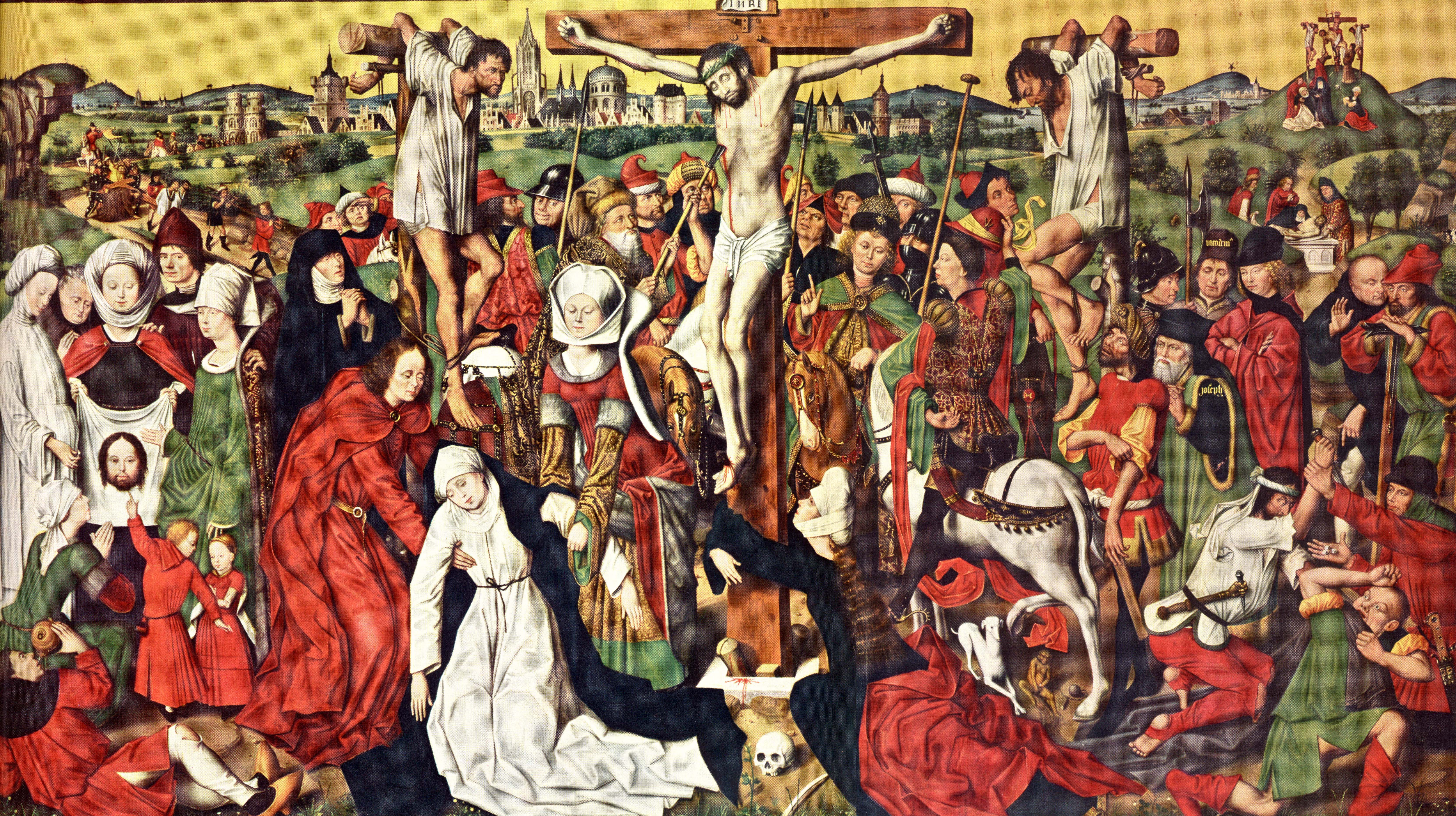 Derick Baegert, Altar in der Propsteikirche Dortmund, Mitteltafel